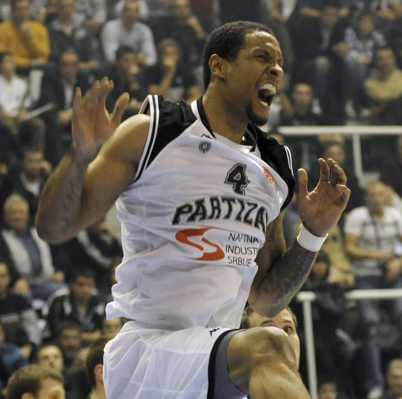 _DSC8045